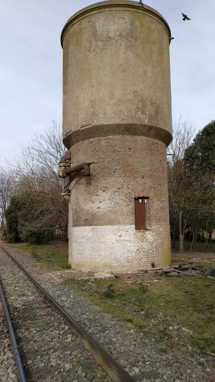 Viejo tanque de agua para las locomotoras